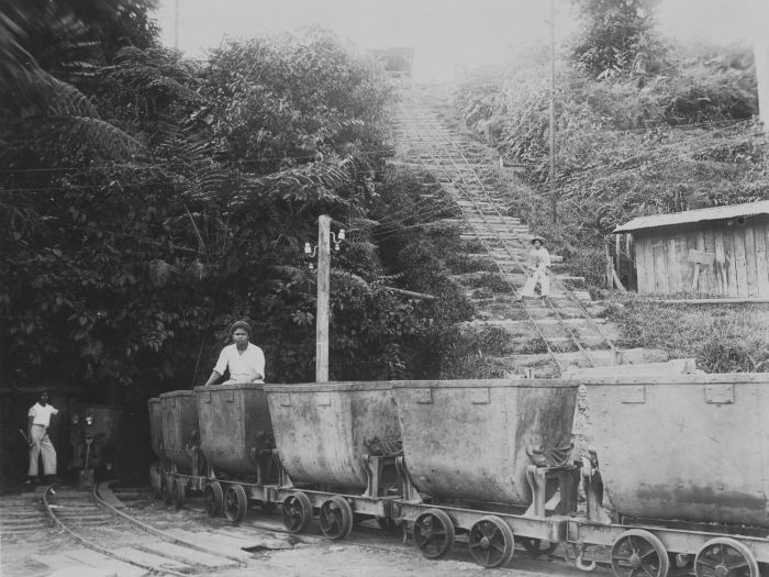 foto. Mijnwerkers bij lorries voor een tunnel van de goud- en zilvermijnen te Tambang Sawah